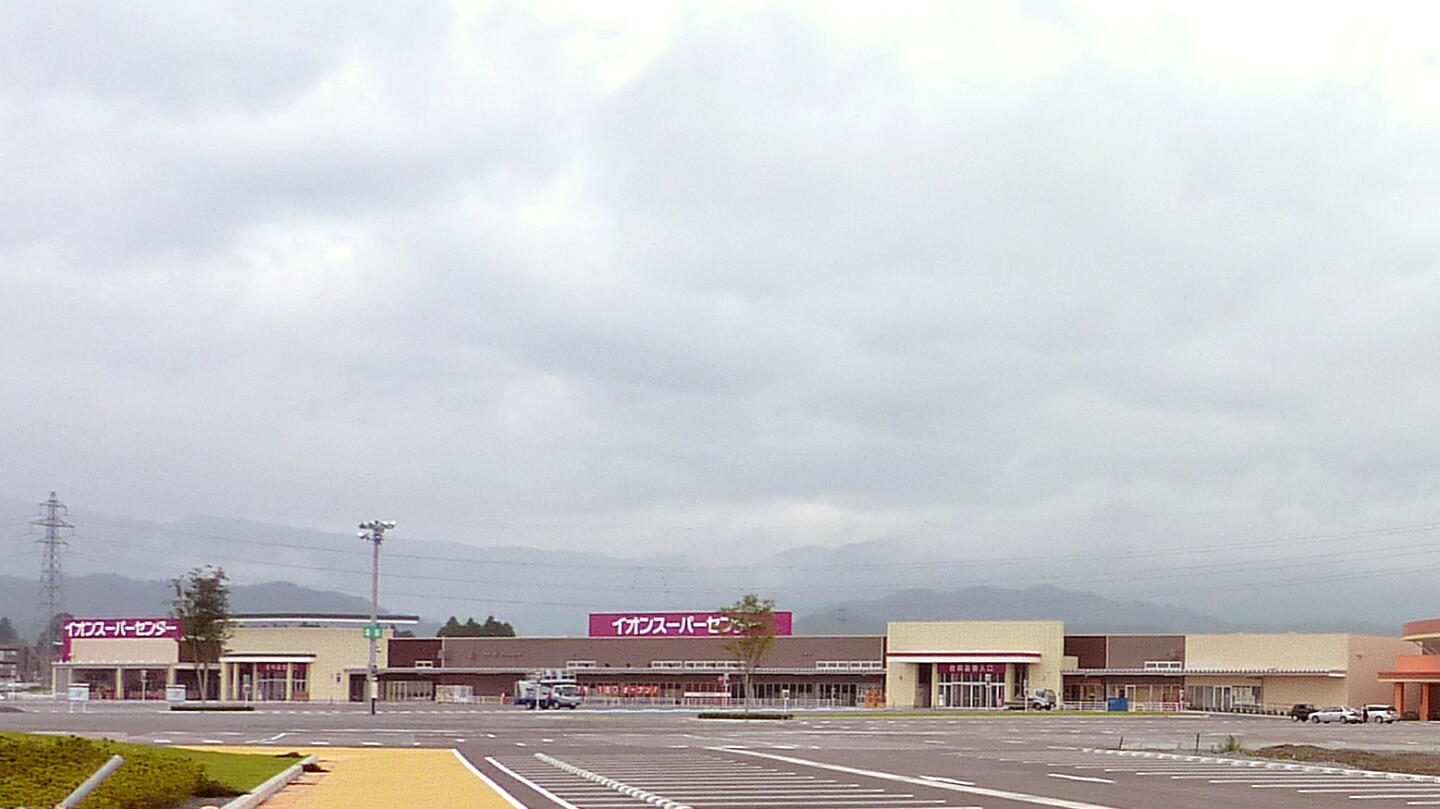 イオンスーパーセンター南相馬店